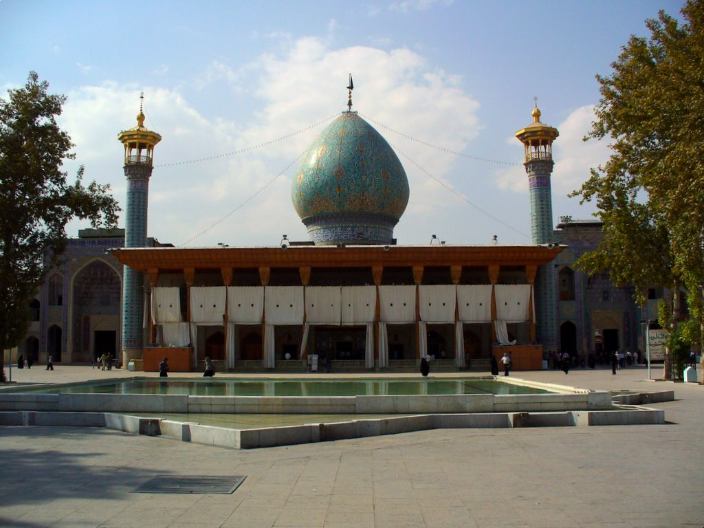 Shahcheragh